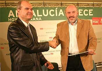 Manuel Chaves y Francisco Garrido , Andalucía